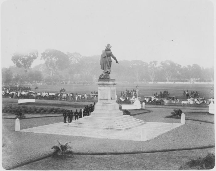 Foto. Militaire parade bij het standbeeld van Jan Pietersz. Coen op het Waterlooplein in Batavia tijdens de kroningsfeesten van Koningin Wilhelmina